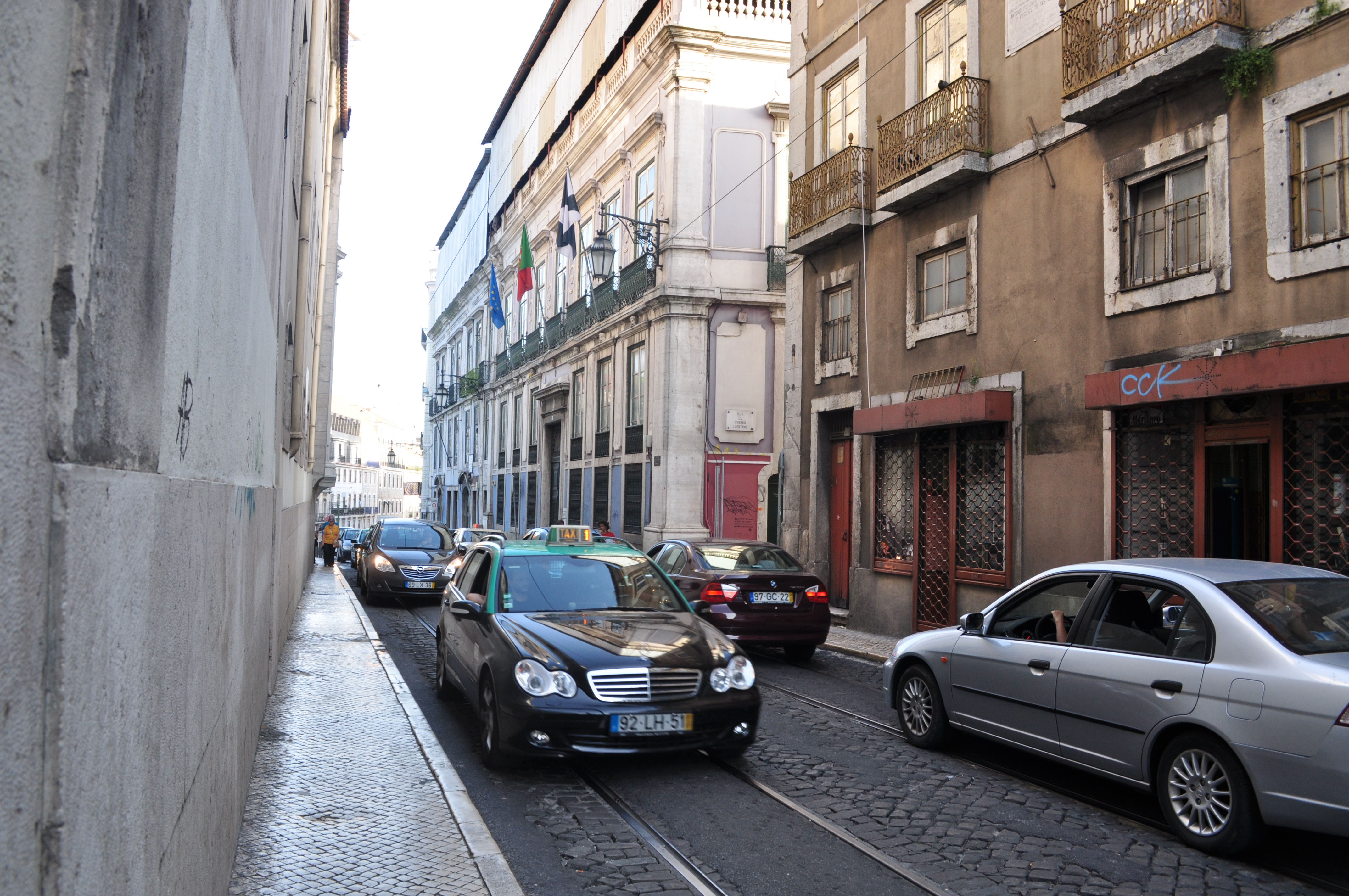 Taksioj kaj aŭtoj en strato kun tramtrakoj.